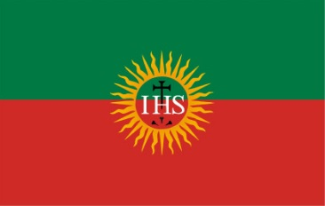 Bandera de la Municipalidad de San Ignacio, Provincia de Misiones, Argentina. Fuente: periodista Horacio Cambeiro.